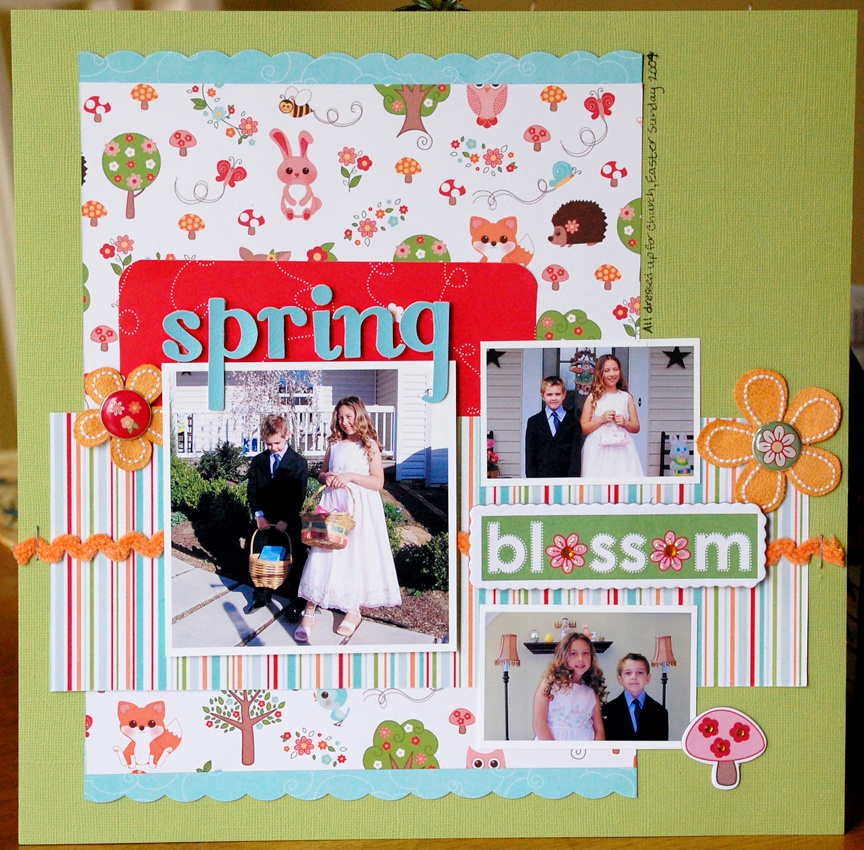 Imaginisce papers